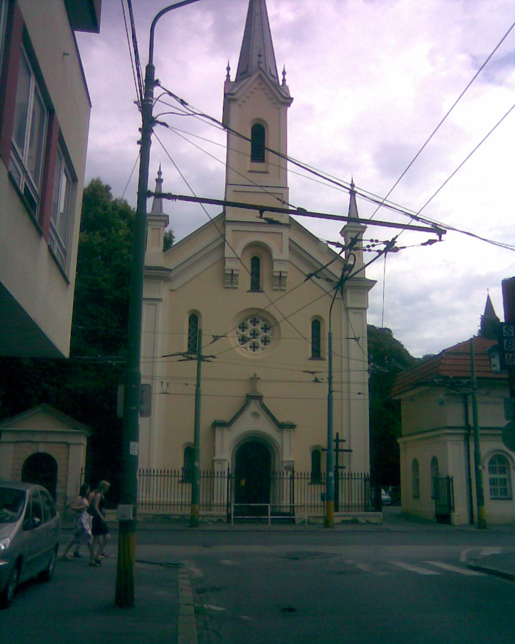 Chrám Povýšenia vznešeného a životodarného kríža This medium shows the protected monument with the number 101-279/5 in the Slovak Republic.